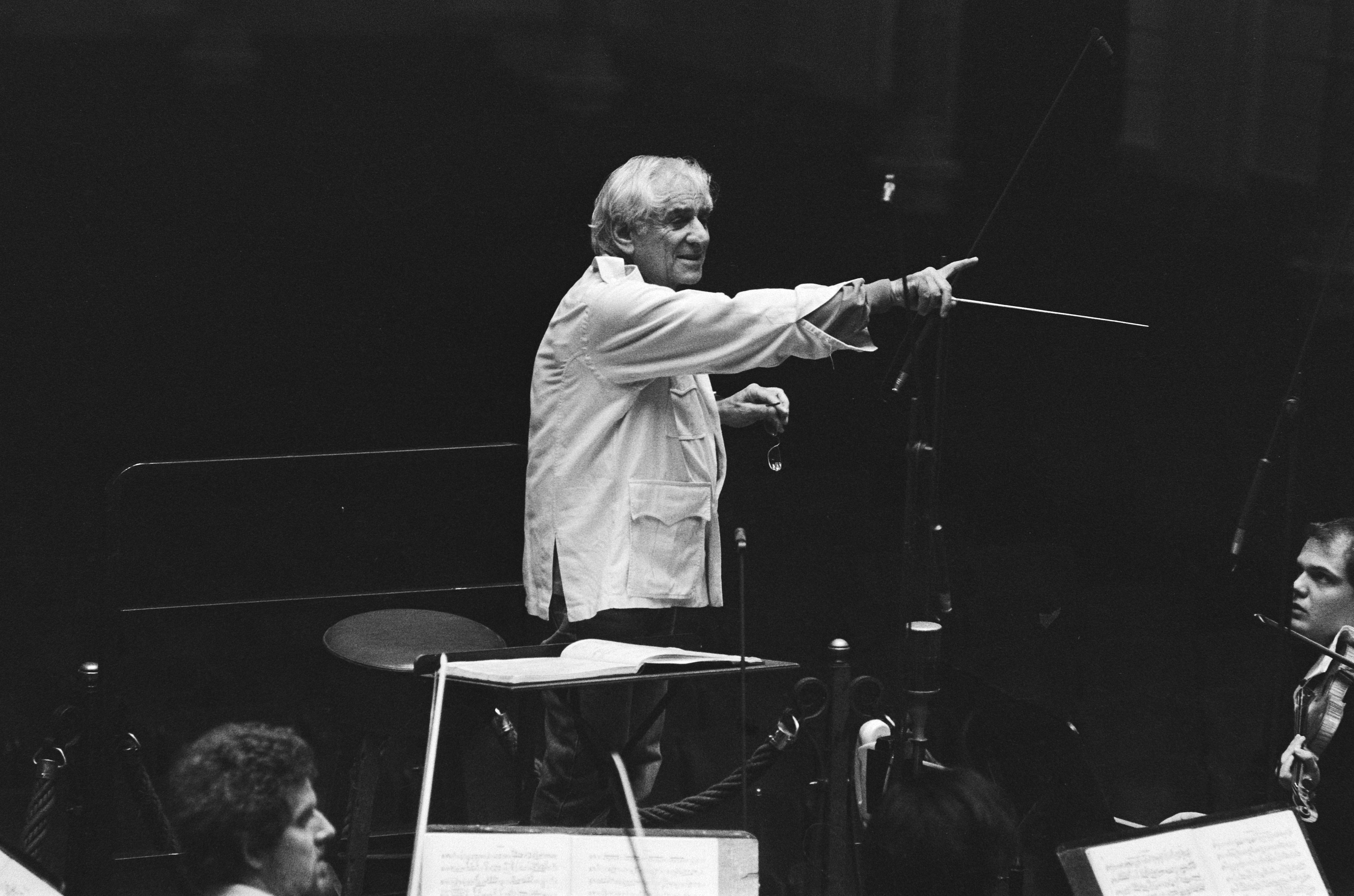 Collectie / Archief : Fotocollectie Anefo Reportage / Serie : [ onbekend ] Beschrijving : Holland Festival ; dirigent Leonard Bernstein zal het met het Concertgebouworkest openen, Leonard Bernstein aan het dirigeren Datum : 30 mei 1985 Trefwoorden : dirigenten, festivals, openingen Persoonsnaam : Bernstein Leonard Instellingsnaam : Concertgebouworkest, Holland Festival Fotograaf : Vollebregt, Sjakkelien / Anefo Auteursrechthebbende : Nationaal Archief Materiaalsoort : Negatief (zwart/wit) Nummer archiefinventaris : bekijk toegang 2.24.01.05 Bestanddeelnummer : 933-3400